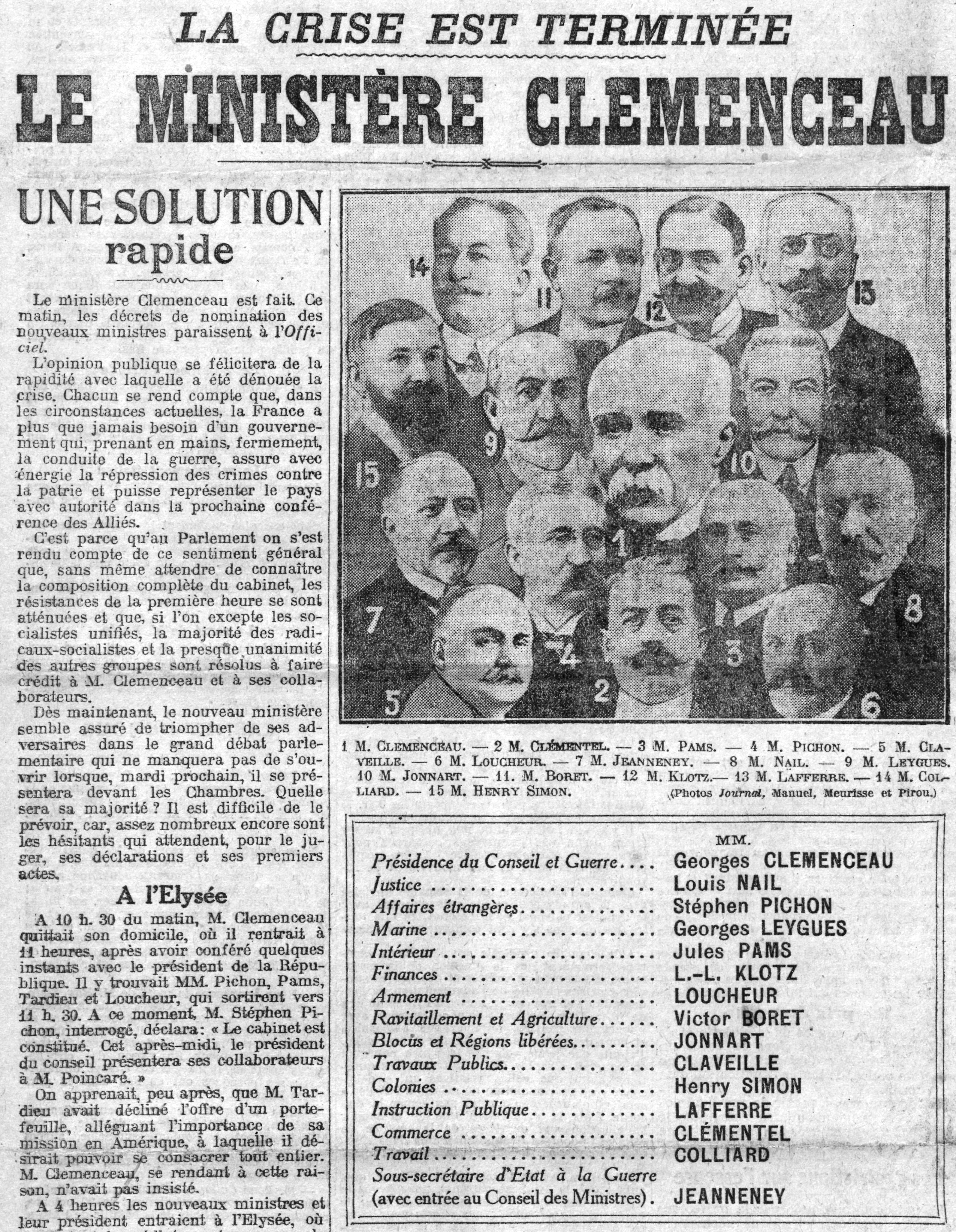 Le ministère Clemenceau, Le Journal du samedi 17 novembre 1917.